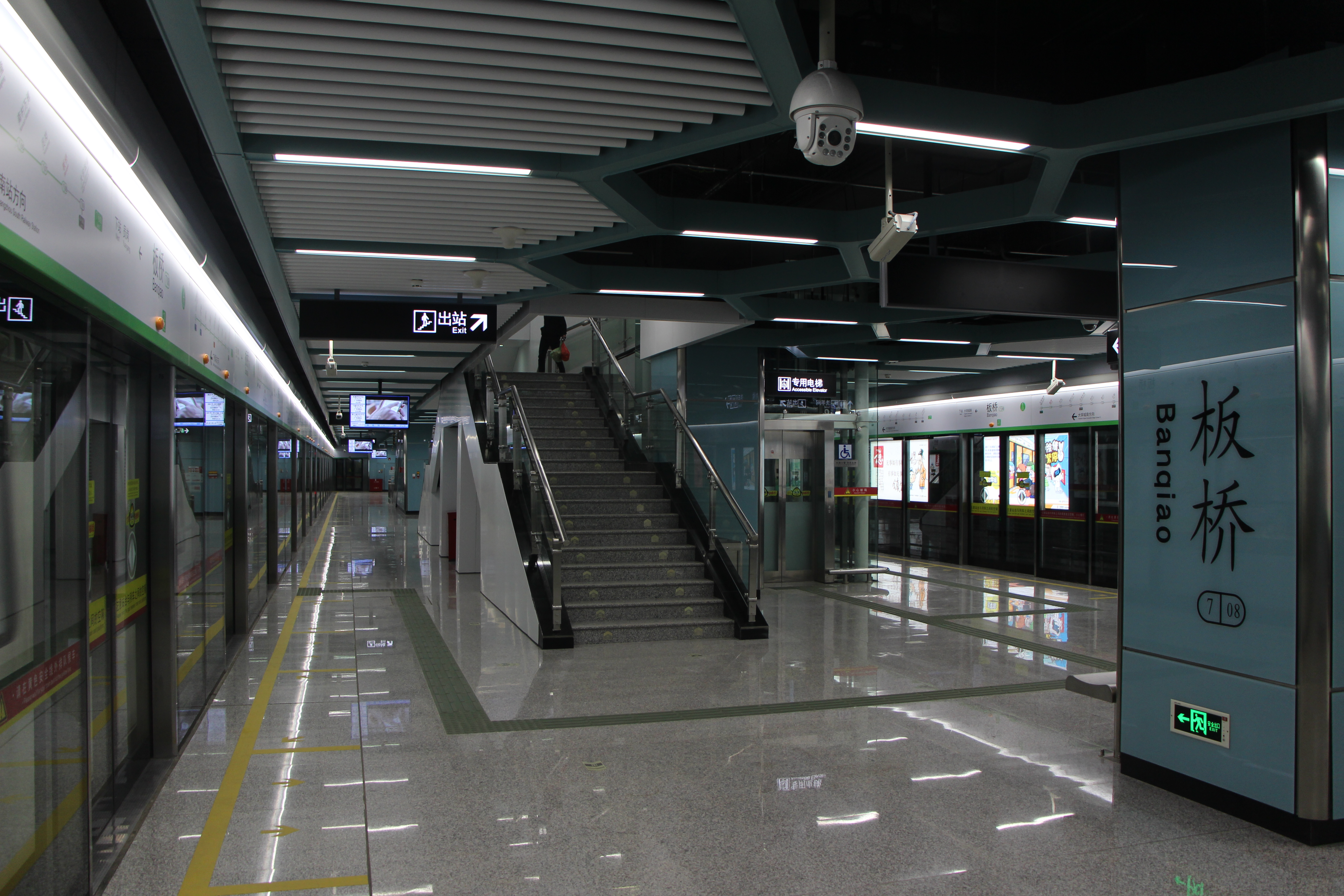 广州地铁板桥站